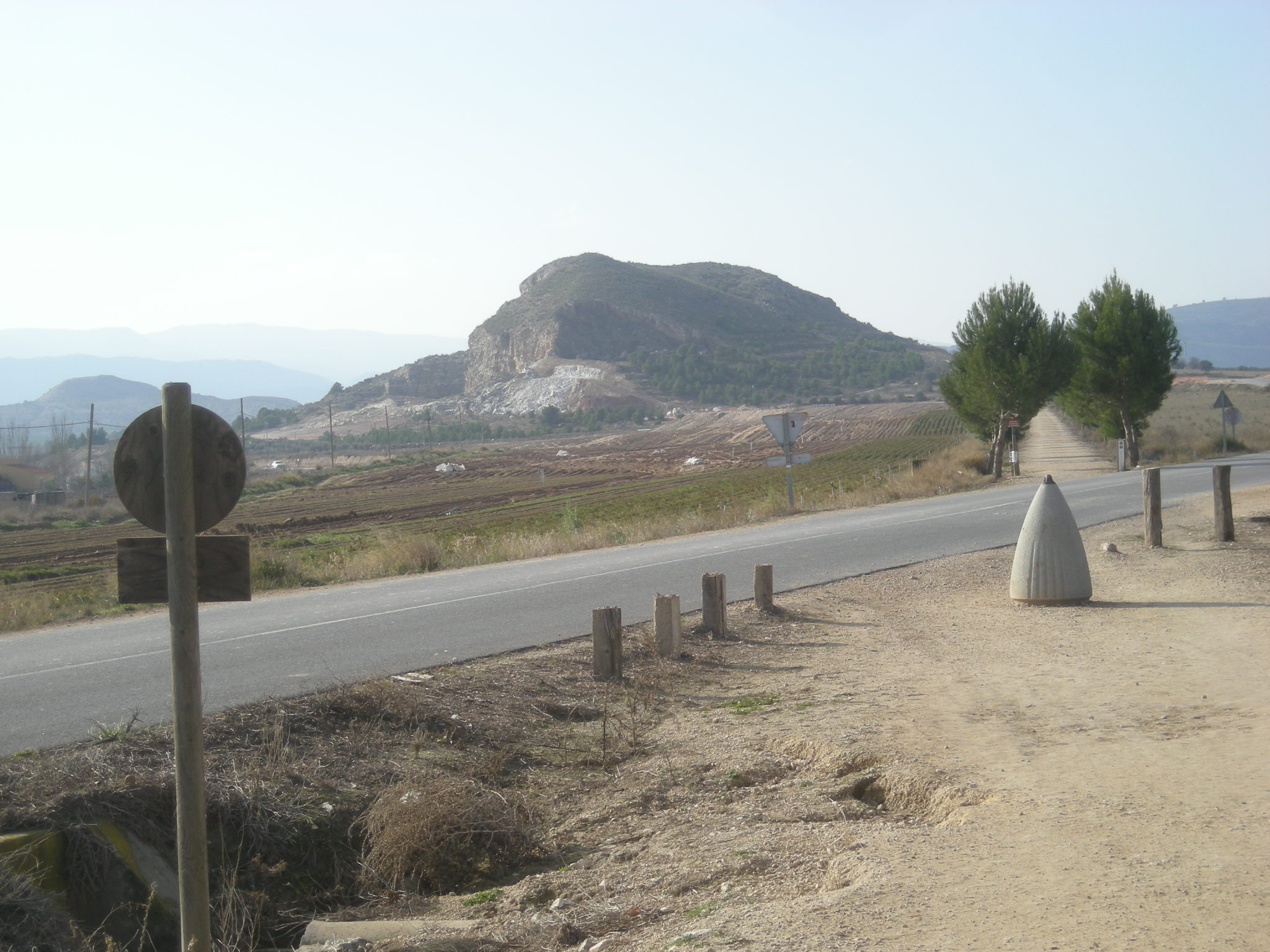 Vía verde del Chicharra cruzando el camino viejo de la Virgen, camino de Las Virtudes.